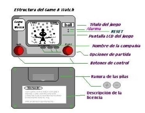 Este es un dibujo que muestra el diseño y la estructura básica de un Game & Watch, en este caso, usamos el juego de malabáres para la explicación general.